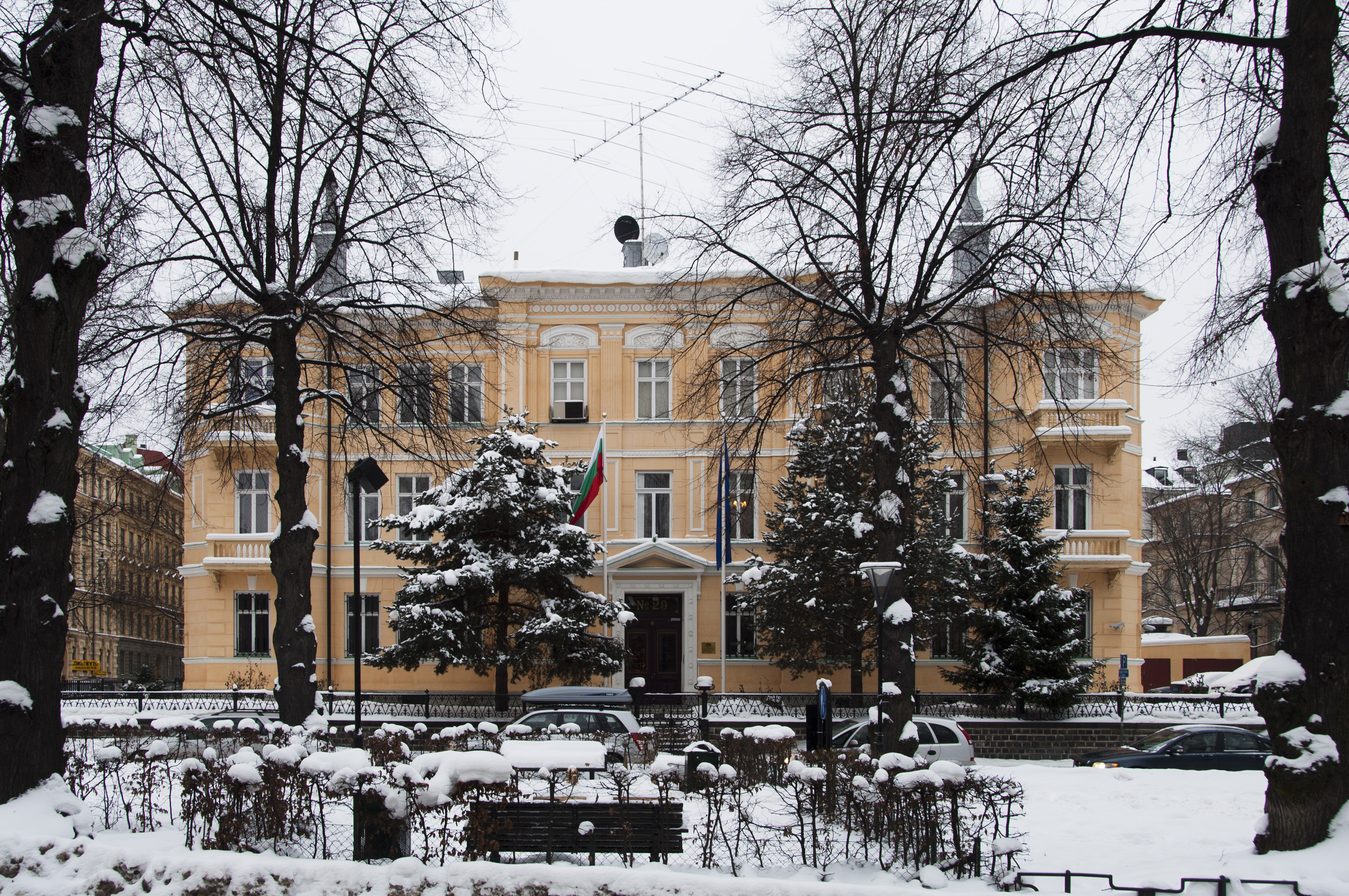 Langenskiöldska villan. Karlavägen 29. Byggnadsår 1878-80, arkitekter Axel & Hjalmar Kumlien, byggherre och byggmästare D Forssell. Sedan 1970 Bulgariska ambassaden.